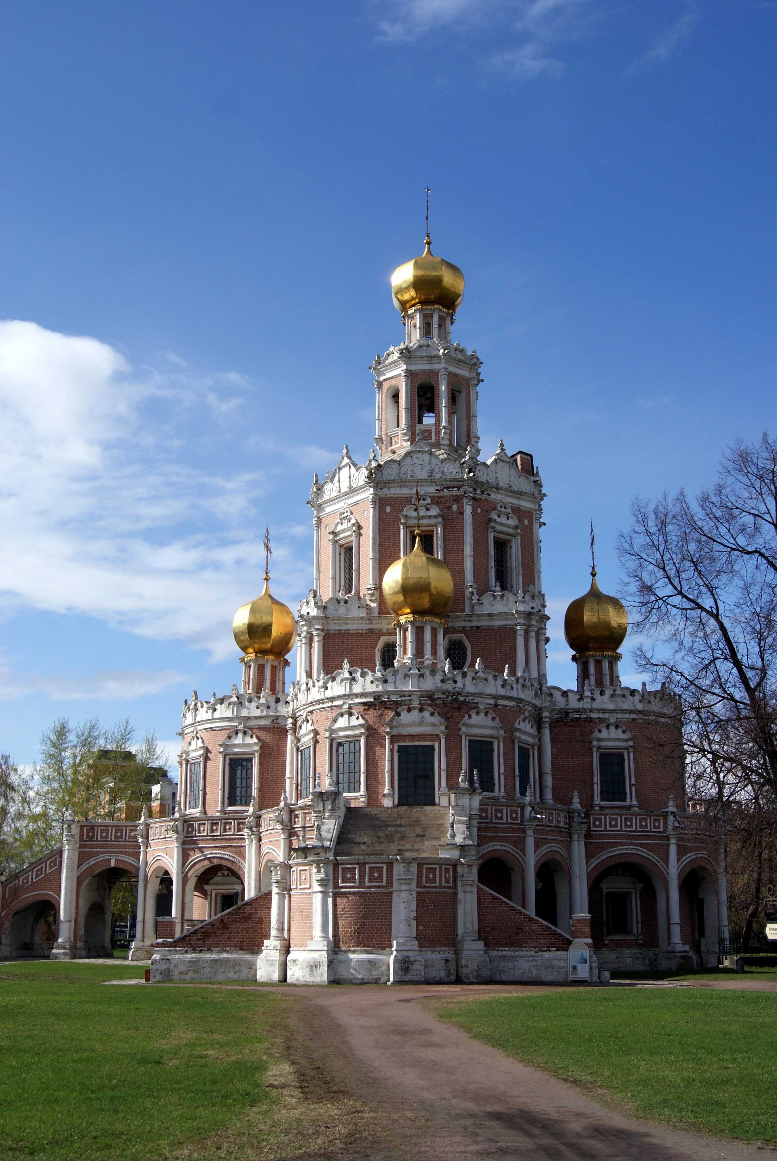 Built in 1694